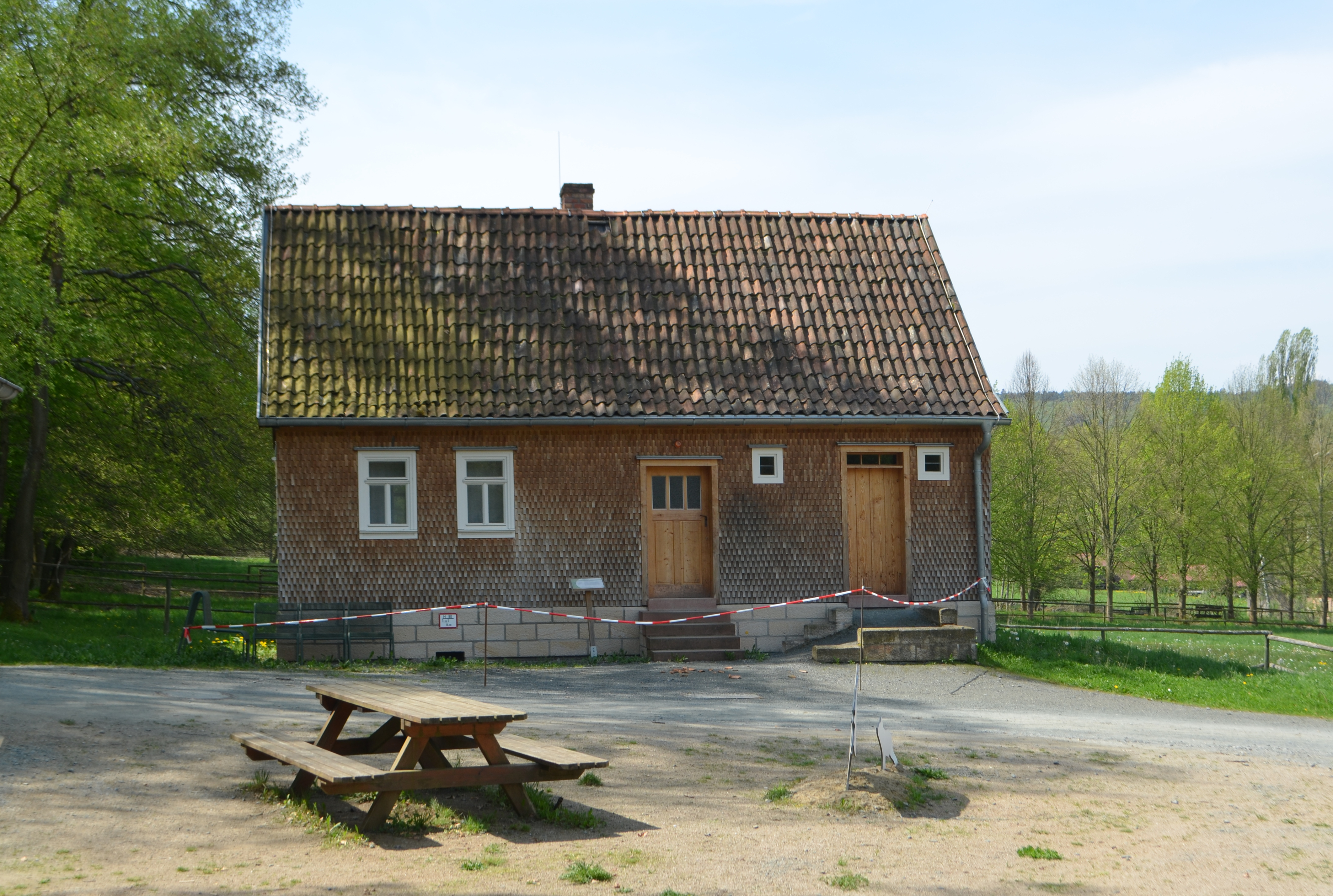 Hessenpark, Altenteilerhaus aus Sieblos